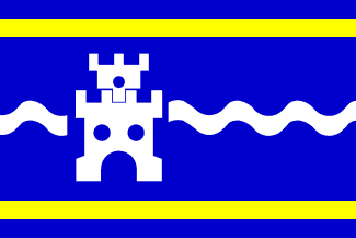 Drapeau de l'ancienne commune et ville actuelle de Dombourg (Domburg en néerlandais)